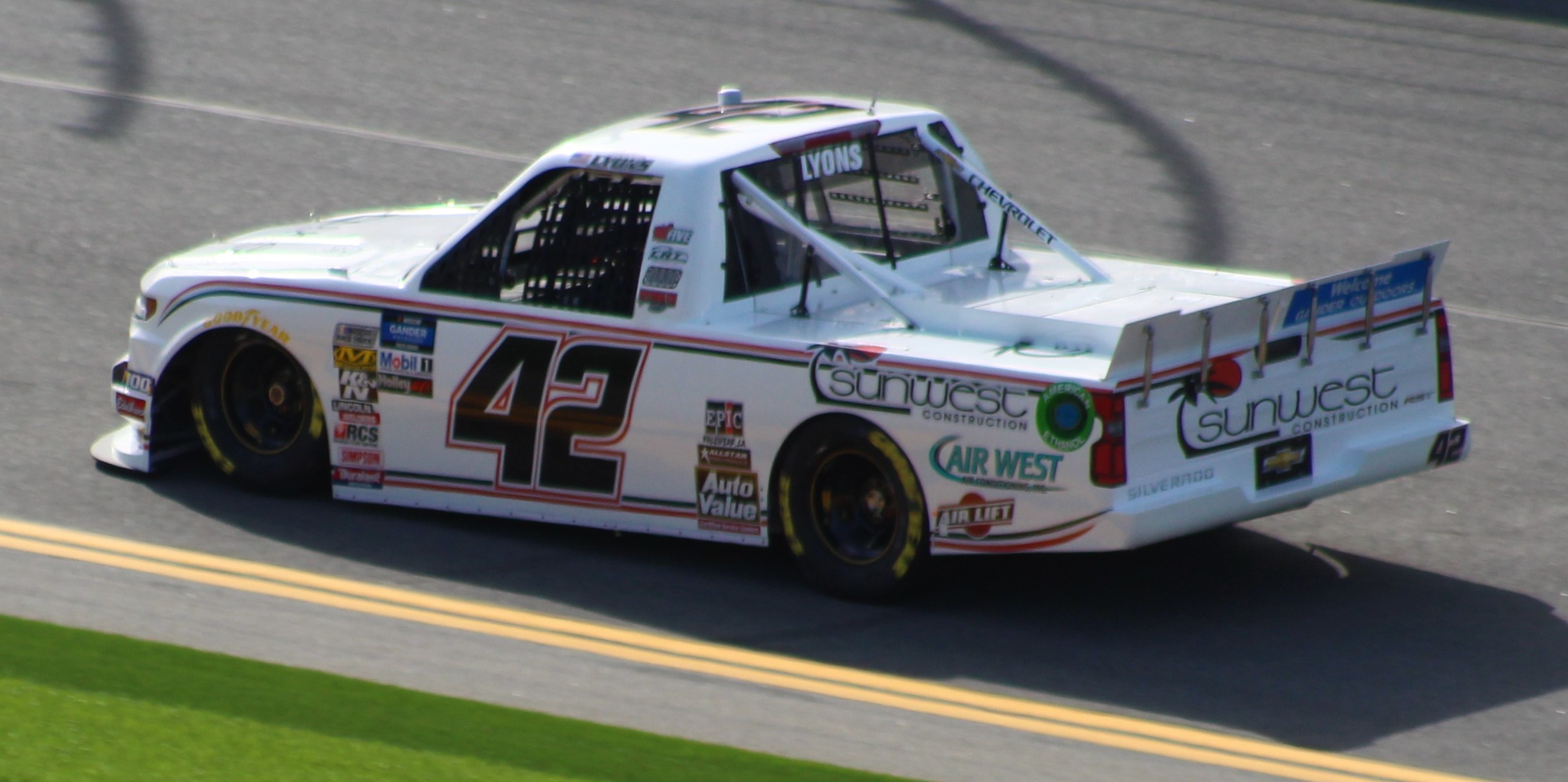 2019 Daytona 500